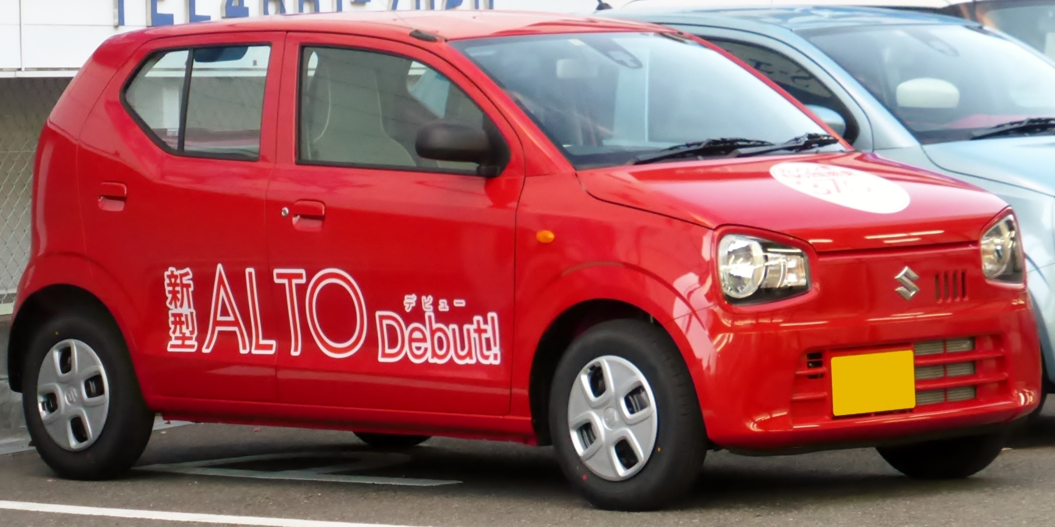 HA36S型スズキ・アルトSを右から撮影。